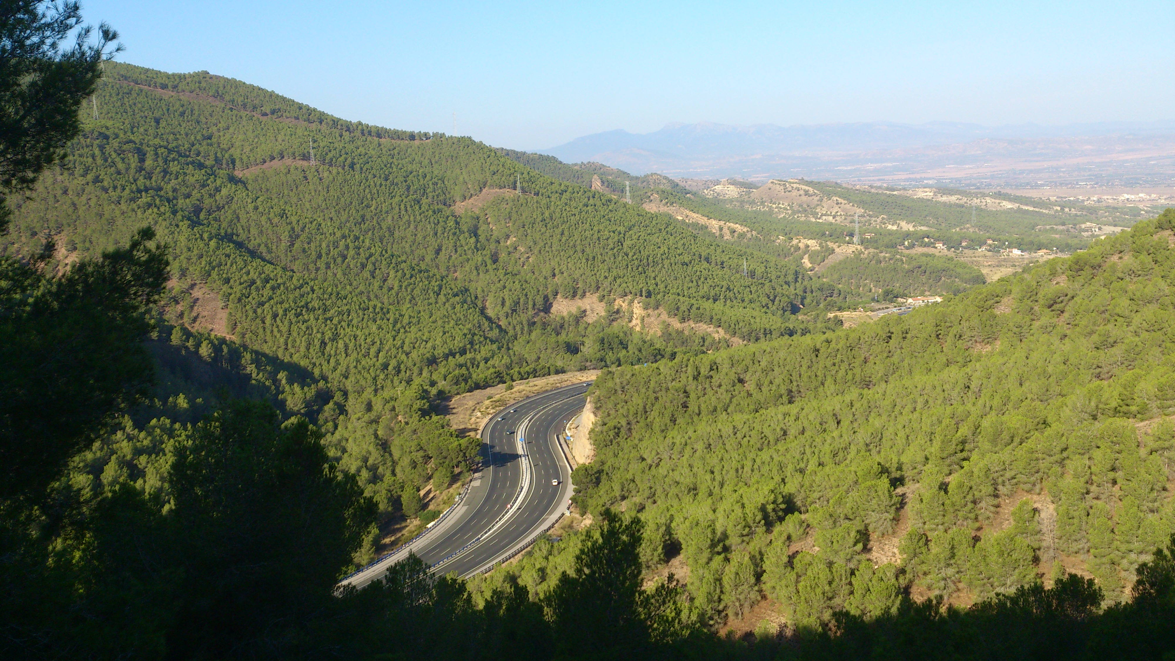 A-30 pasando por el puerto de La Cadena